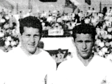 Digitalizácia historického obrázku.Futbalisti Tatrana Prešov. Bratia Laco a Rudolf Pavlovičovci. Slovensko.